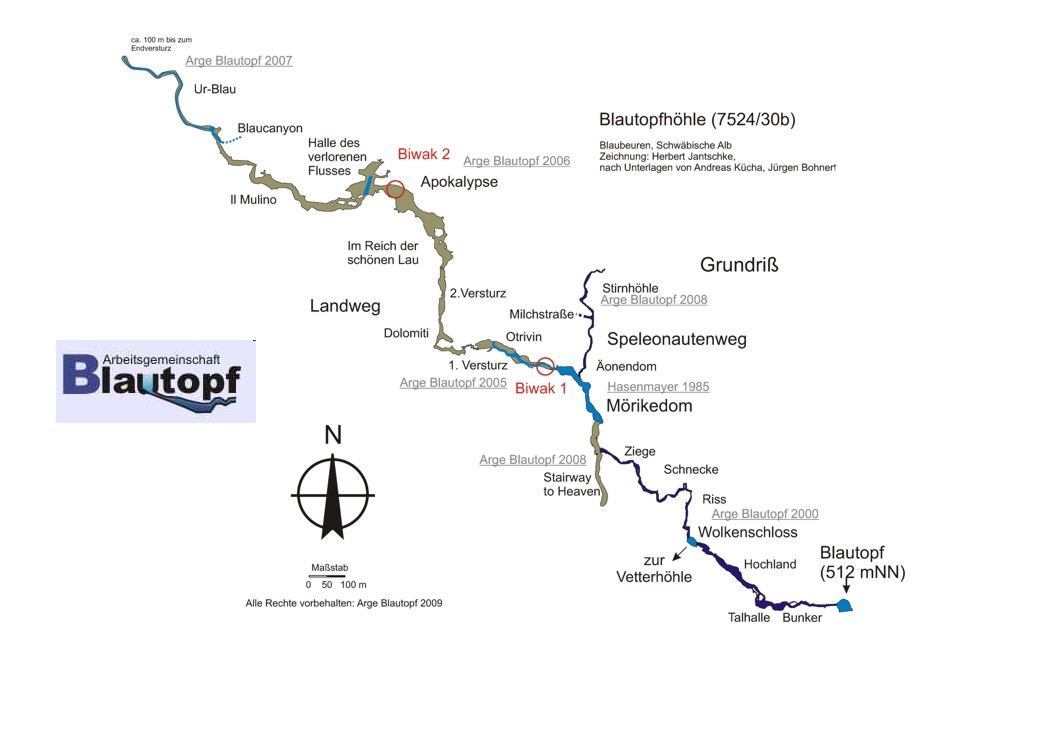 Grundriss der 7524/30b Blautopfhöhle